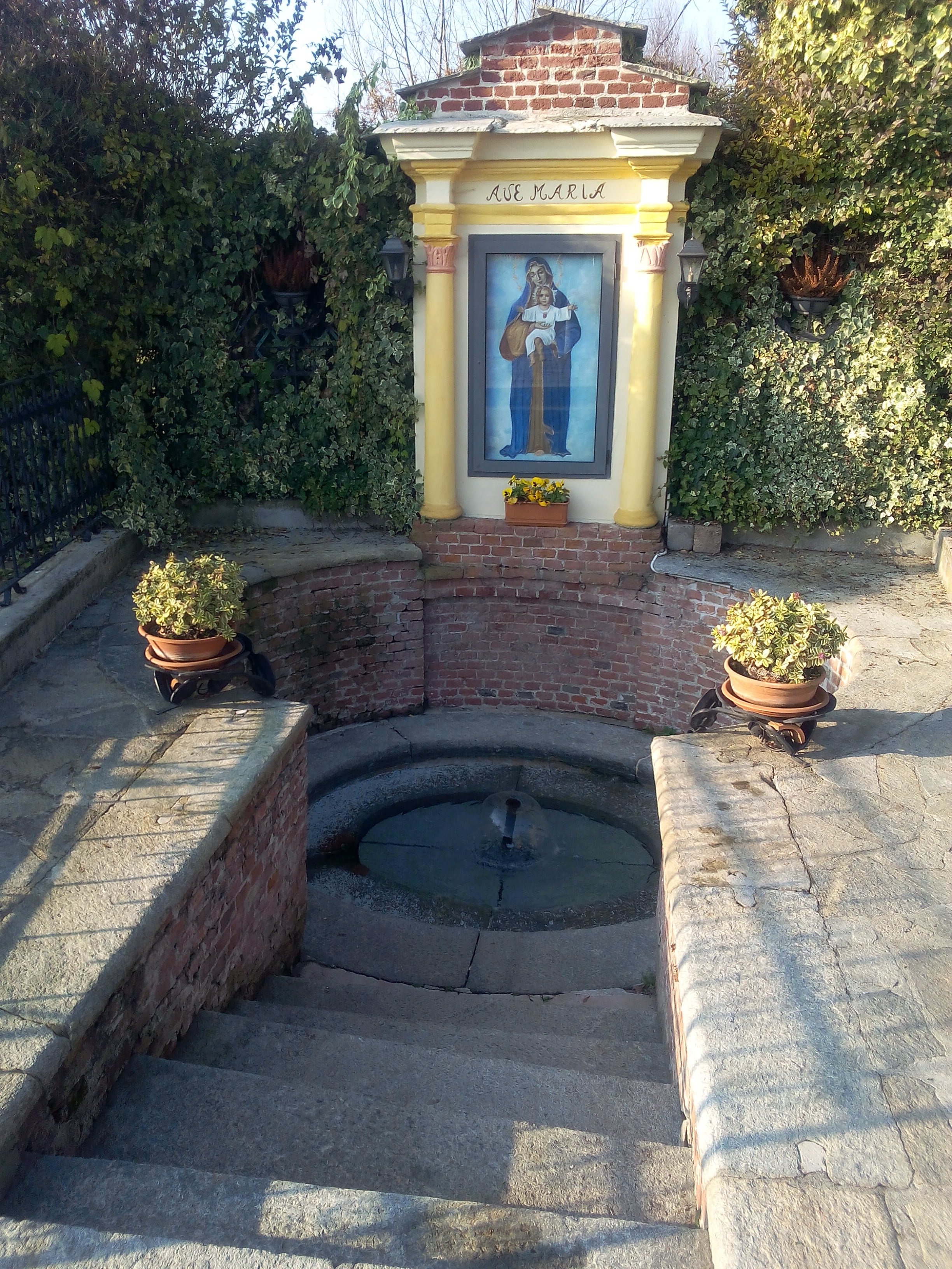 Santuario della madonnina Verolengo: il fontanile